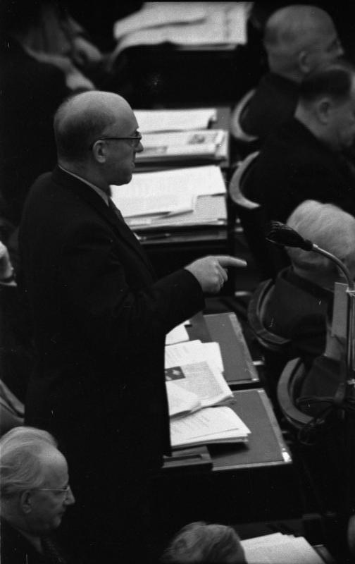 62. Sitzung im 2. Bundestag 1. Lesung: Aussprache über die Pariser Verträge